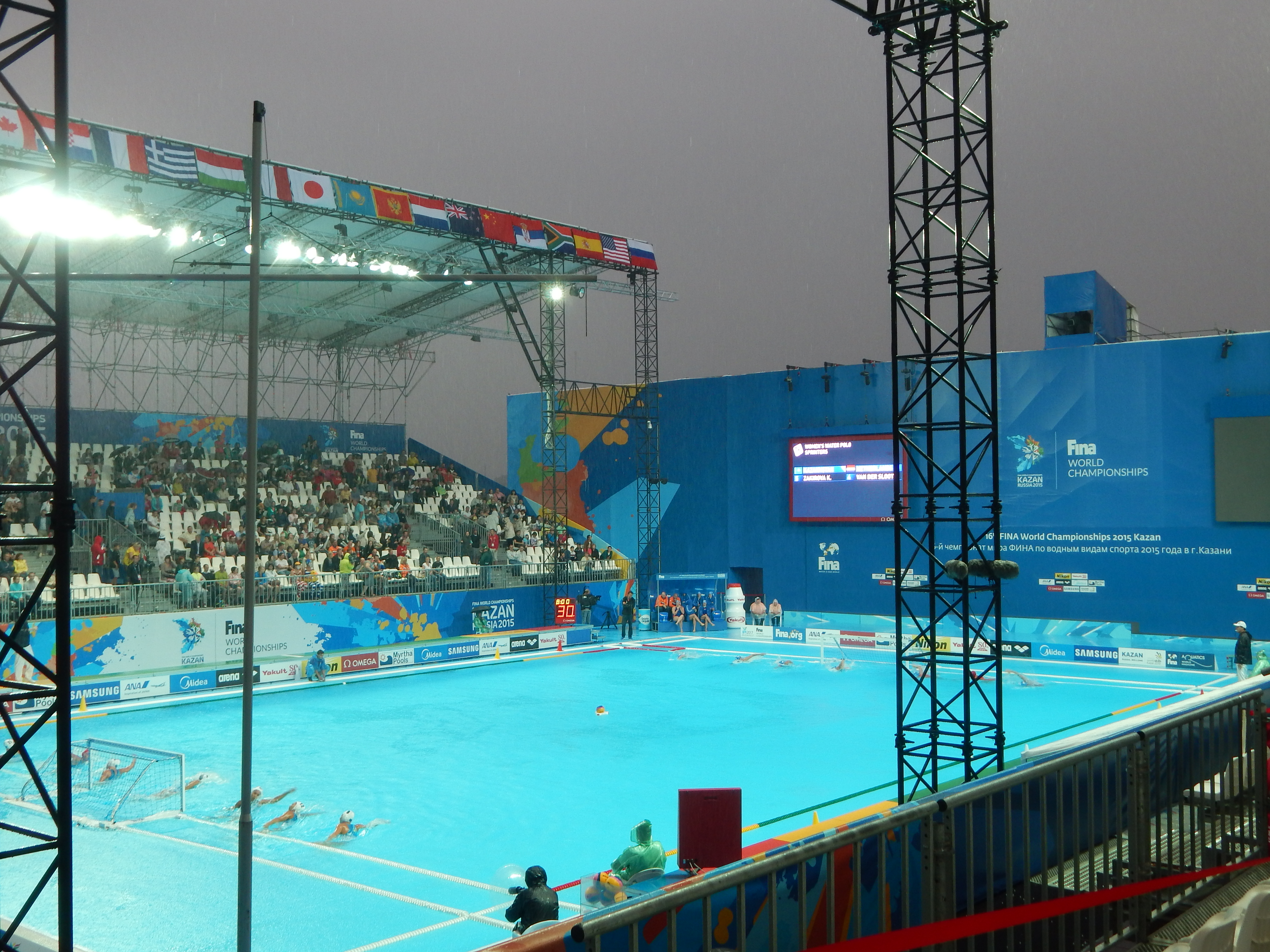 Ватерпольный матч между женскими сборными Казахстана и Нидерландов (квалификация плей-офф)